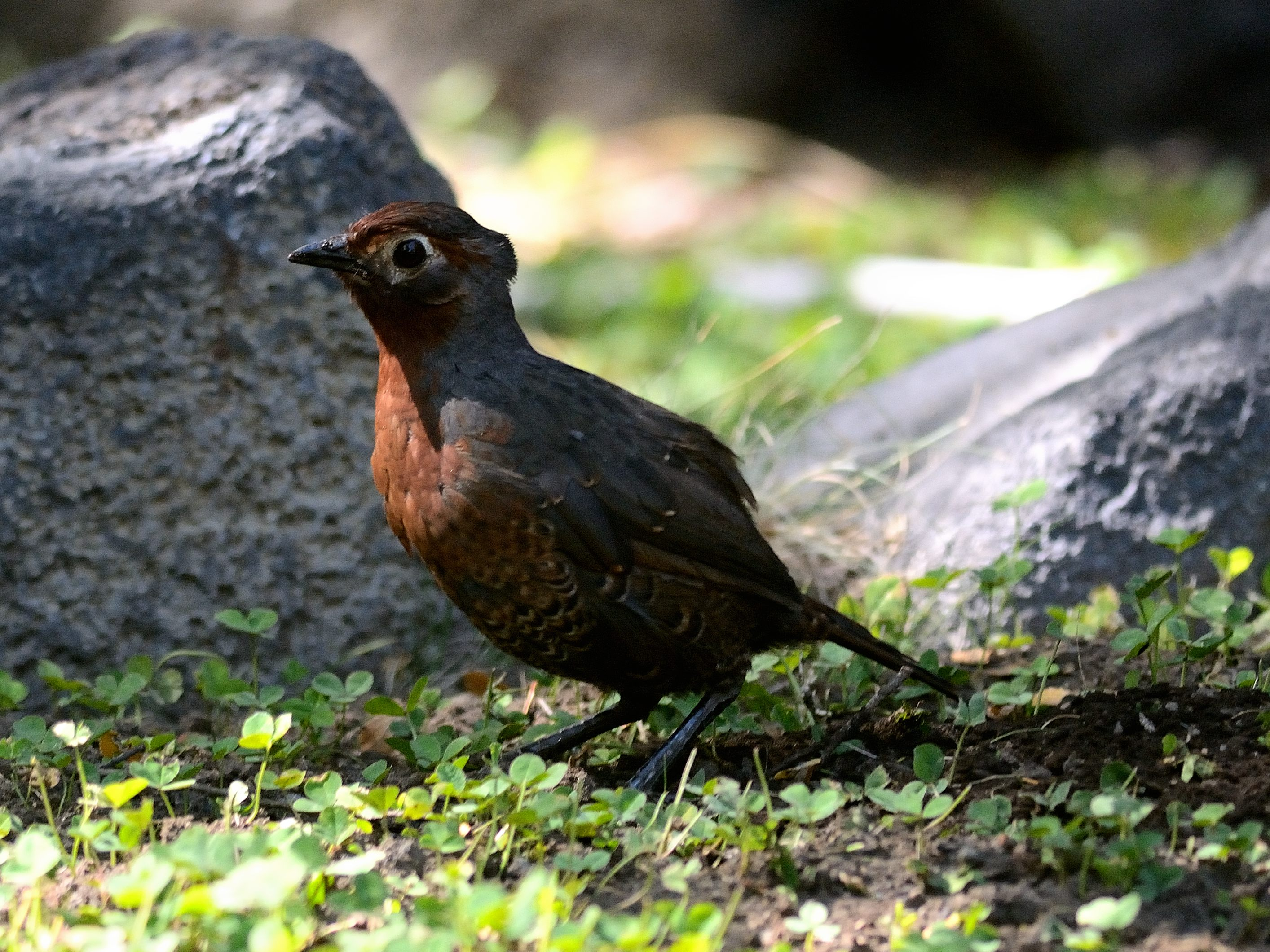 Hued Hued Castaño, Chillán, Chile